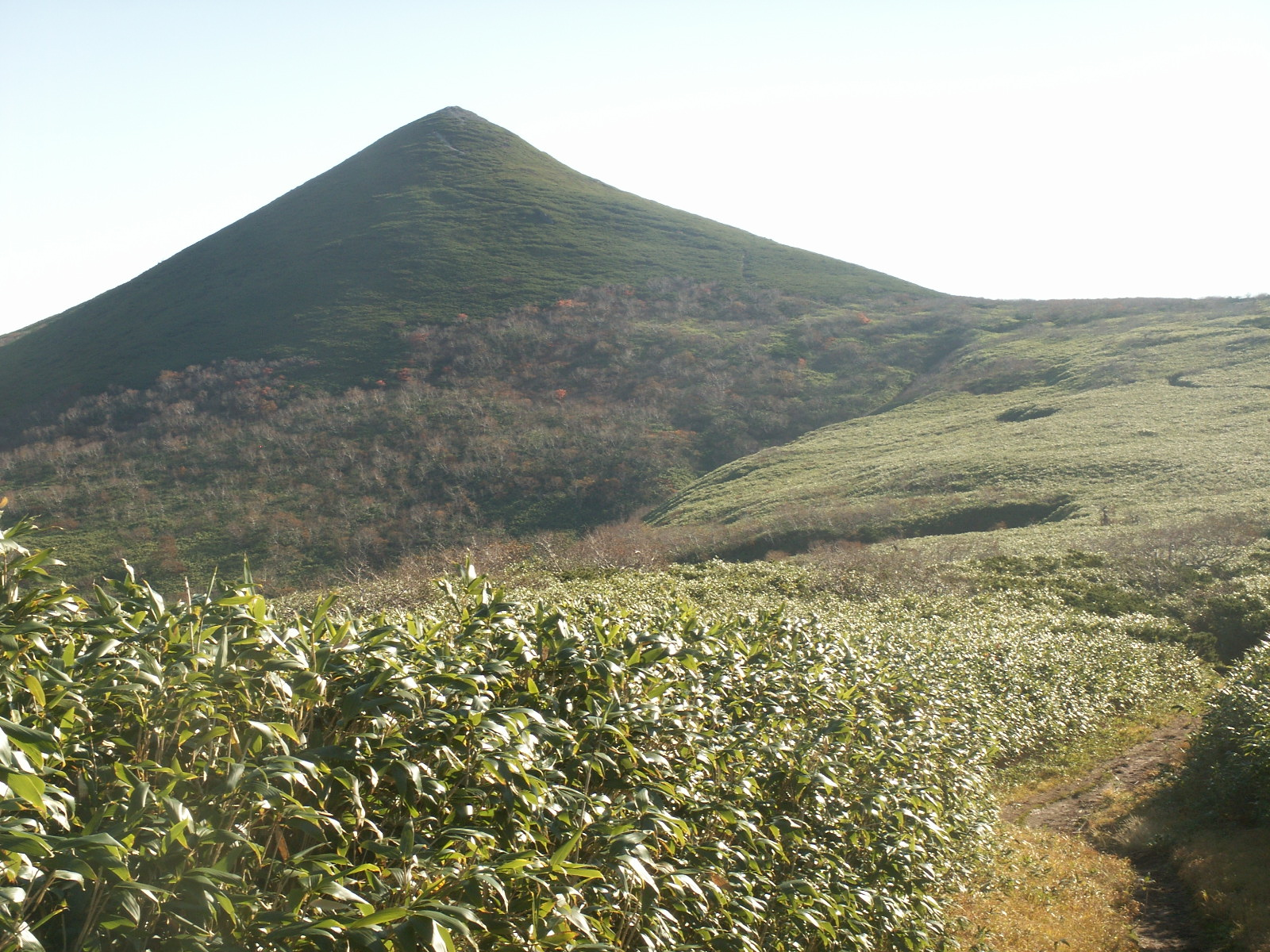 天塩岳 撮影日時 ２００７年１０月６日 撮影場所 天塩岳 撮影者 投稿者（衛兵隊衛士）と同じ 撮影者によるGFDLリリース